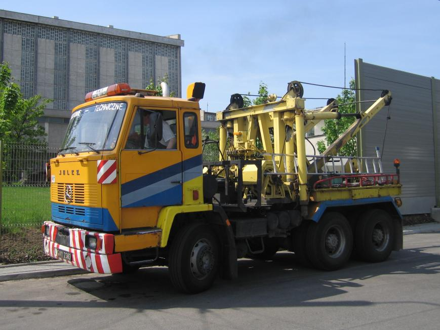 Jelcz C-642 - PKT Gdynia